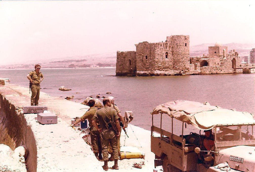 נמל צידון בסיור אנשי מספן המודיעין הימי